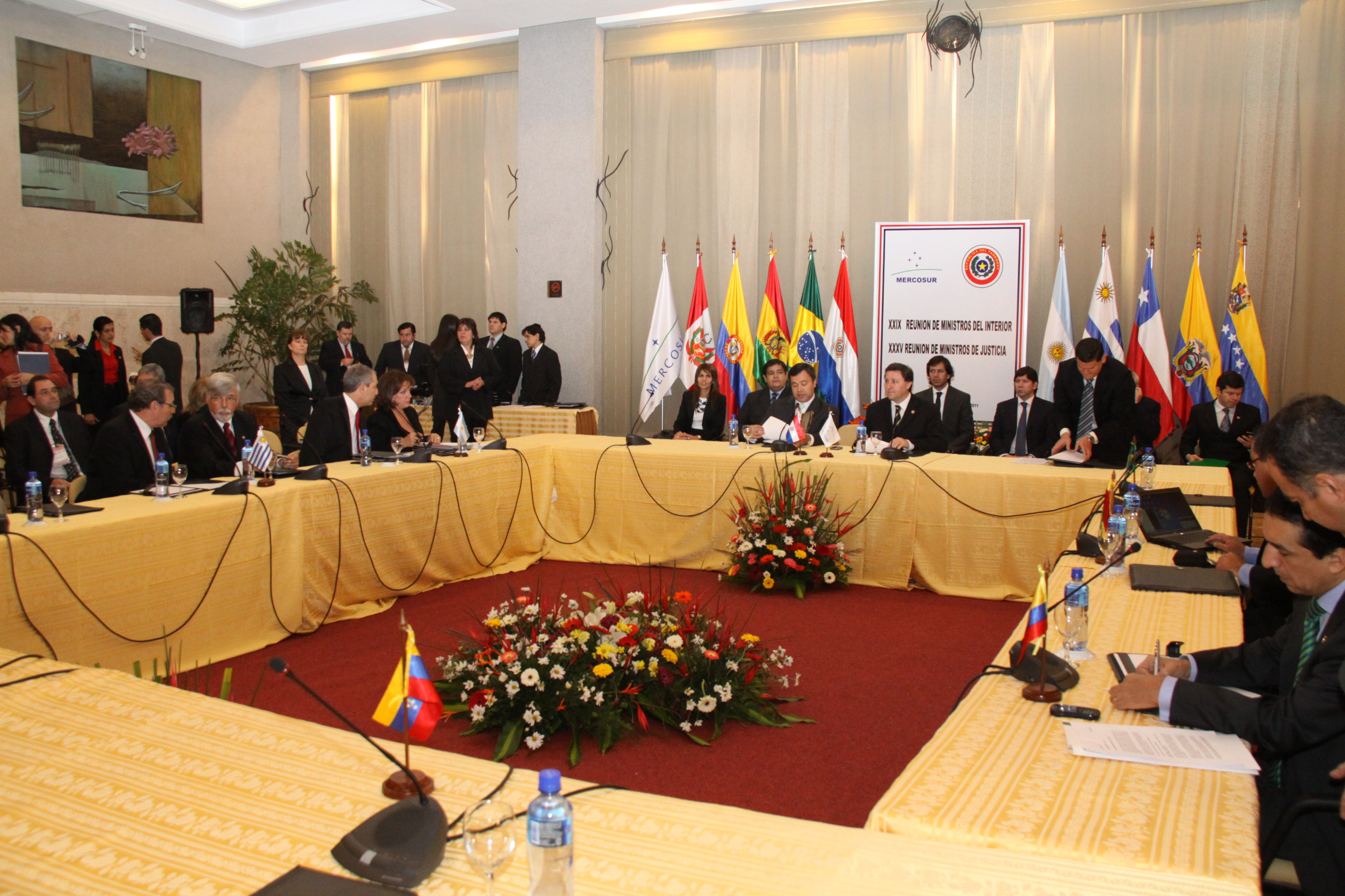 Rafael Filizzola: Campaña por la vicepresidencia año 2013